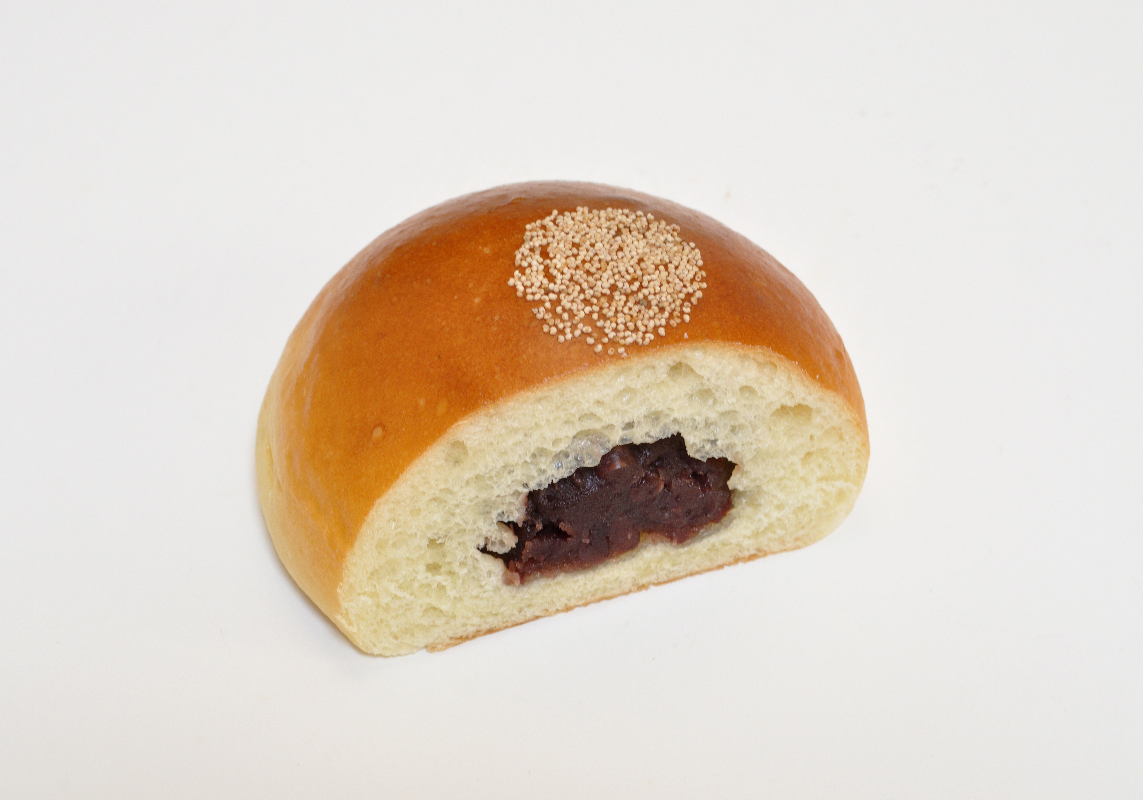 あんパン。アクセントにトッピングされているのはケシの実。 その断面図。